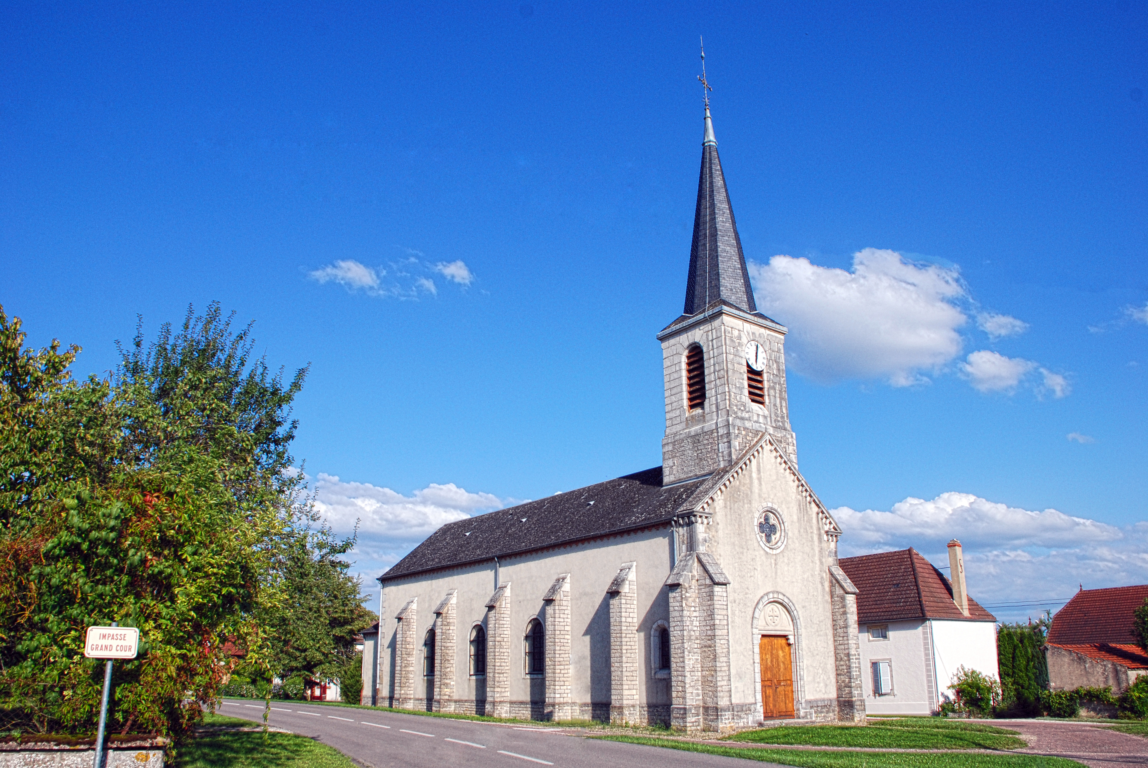 Eglise Saint Rémi